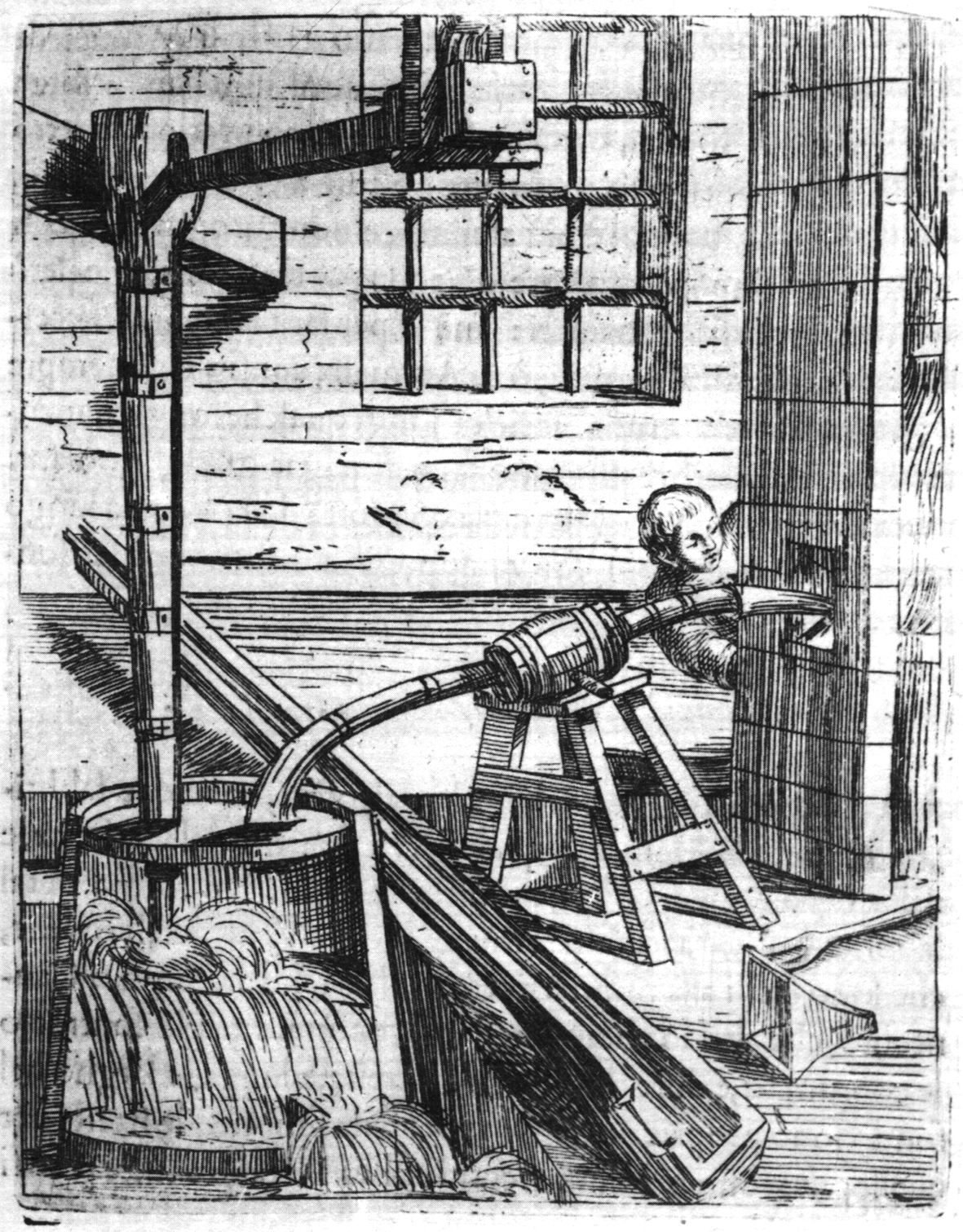 Pratica Minerale. Spaccato della botte e botticella anti umidità